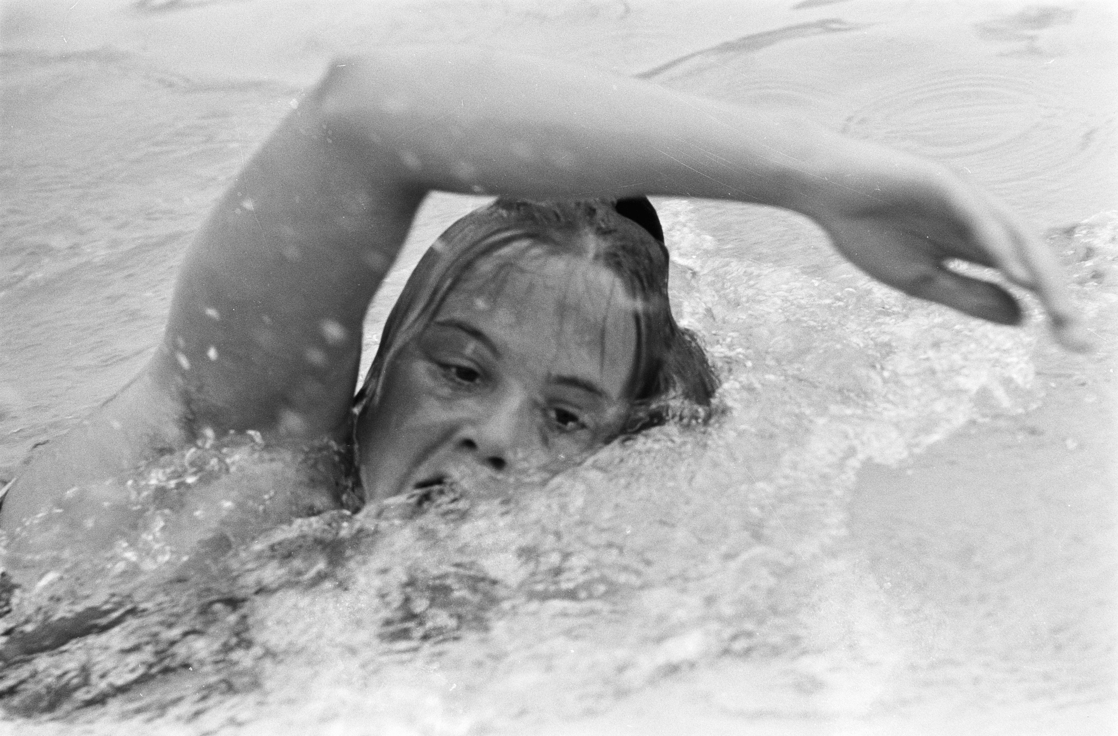 Collectie / Archief : Fotocollectie Anefo Reportage / Serie : Nederlandse kampioenschappen zwemmen 1968 Beschrijving : Hennie Penterman (vrije slag) in aktie Datum : 1 augustus 1968 Locatie : Utrecht (prov.), Utrecht (stad) Trefwoorden : portretten, zwemwedstrijden Persoonsnaam : Penterman, Hennie Fotograaf : Ron Kroon / Anefo Auteursrechthebbende : Nationaal Archief Materiaalsoort : Negatief (zwart/wit) Nummer archiefinventaris : bekijk toegang 2.24.01.05 Bestanddeelnummer : 921-5615